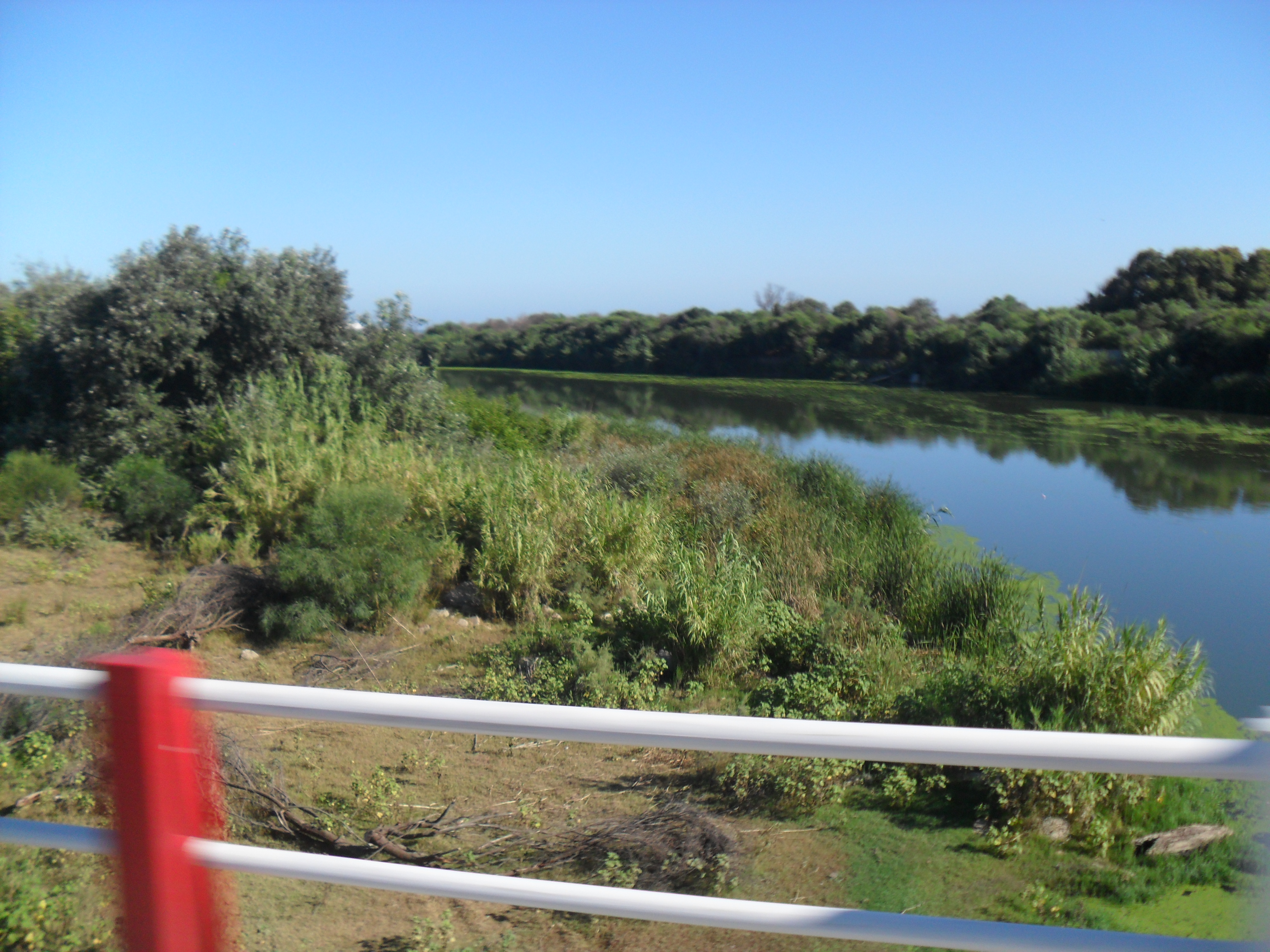 Oued Djen Djen, Taher (Algérie)